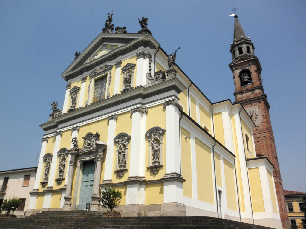 Chiesa parrocchiale di Vaiano Cremasco